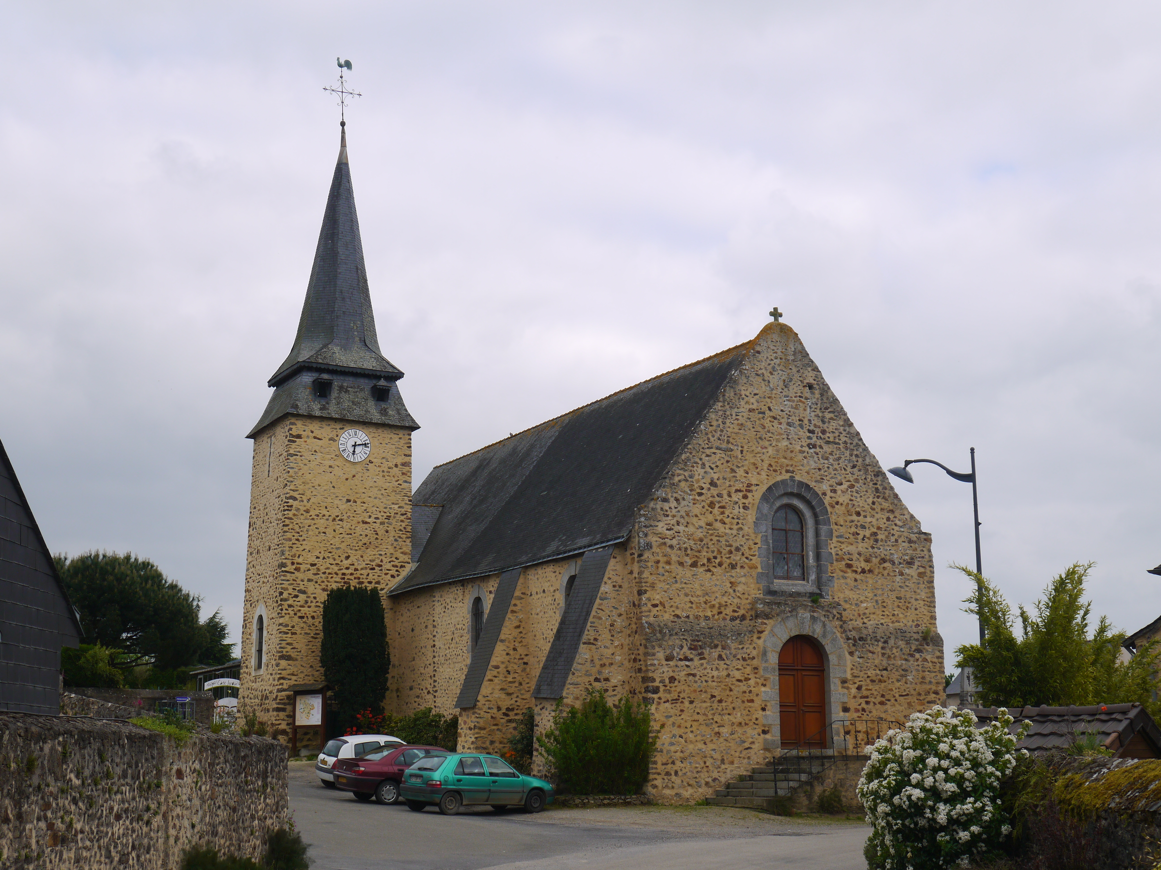 L'église Saint-Pierre.